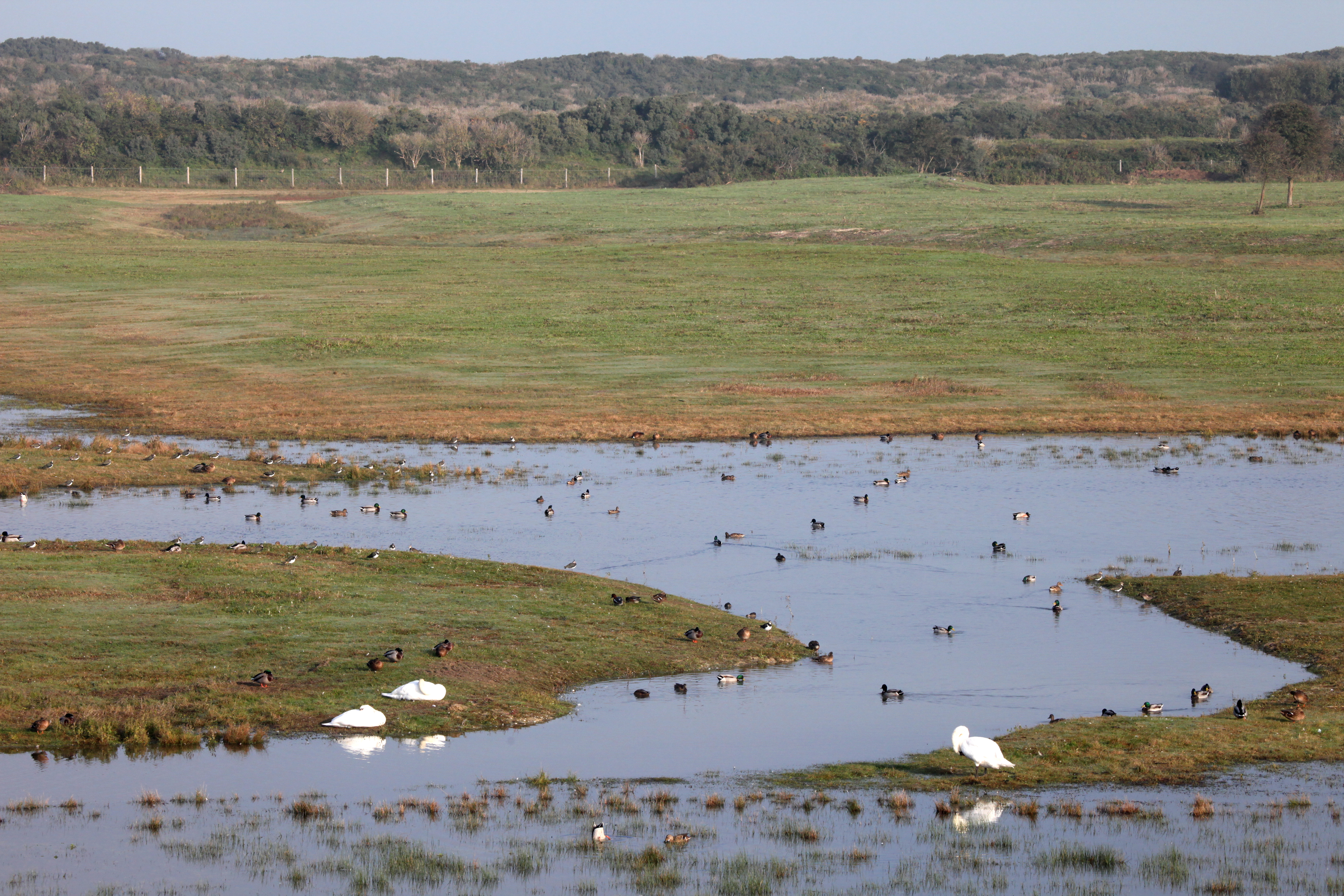 Mares devant l'observatoire ornithologique.